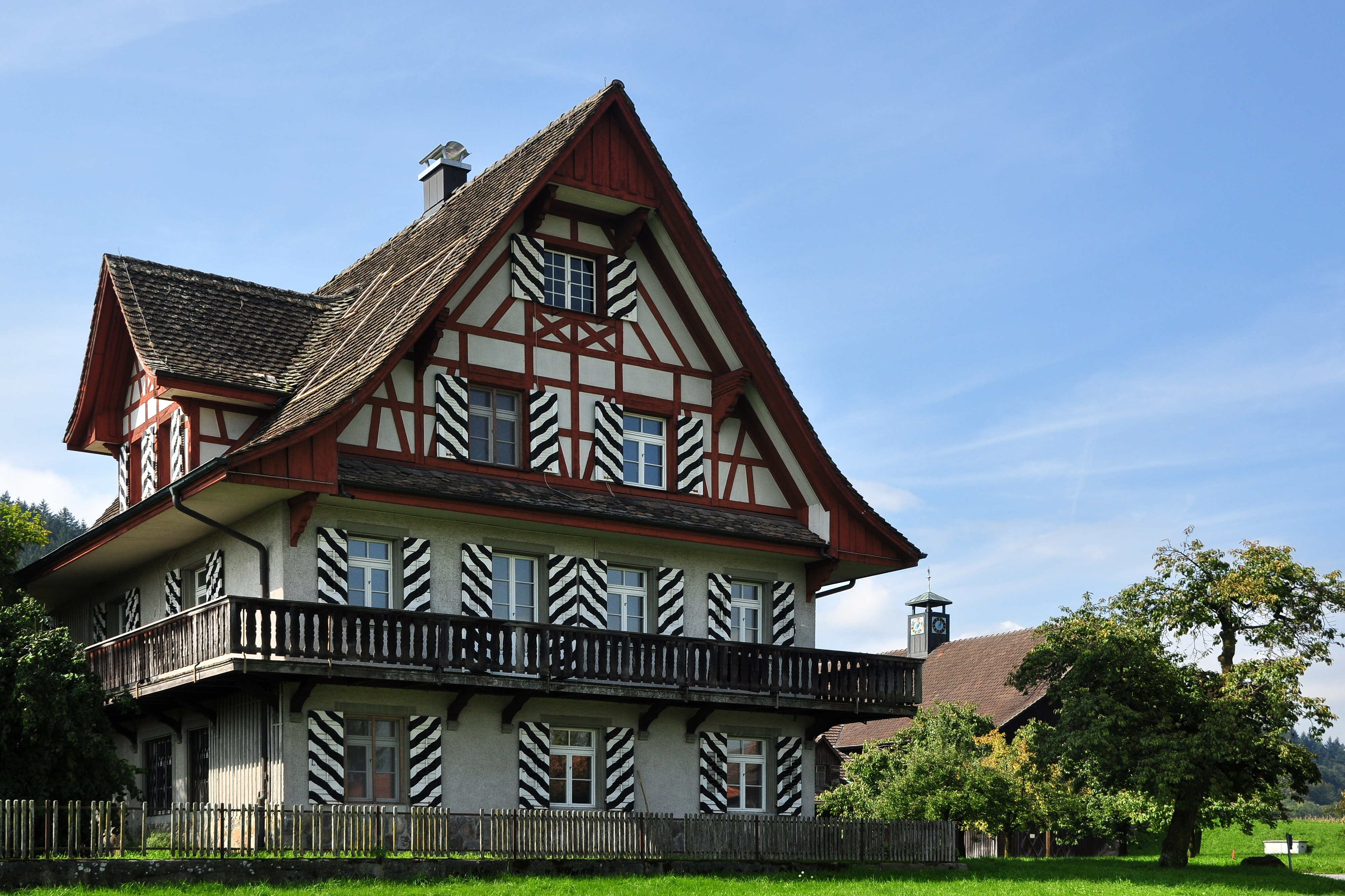 Landgut Bocken in Horgen (Switzerland)